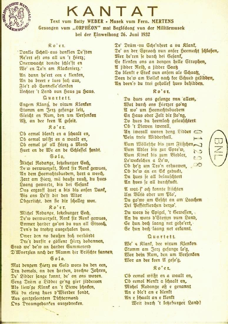 Luxembourg. Texte de la cantate chantée à l'occasion de l'inauguration du monument Michel Rodange le 26 juin 1932.